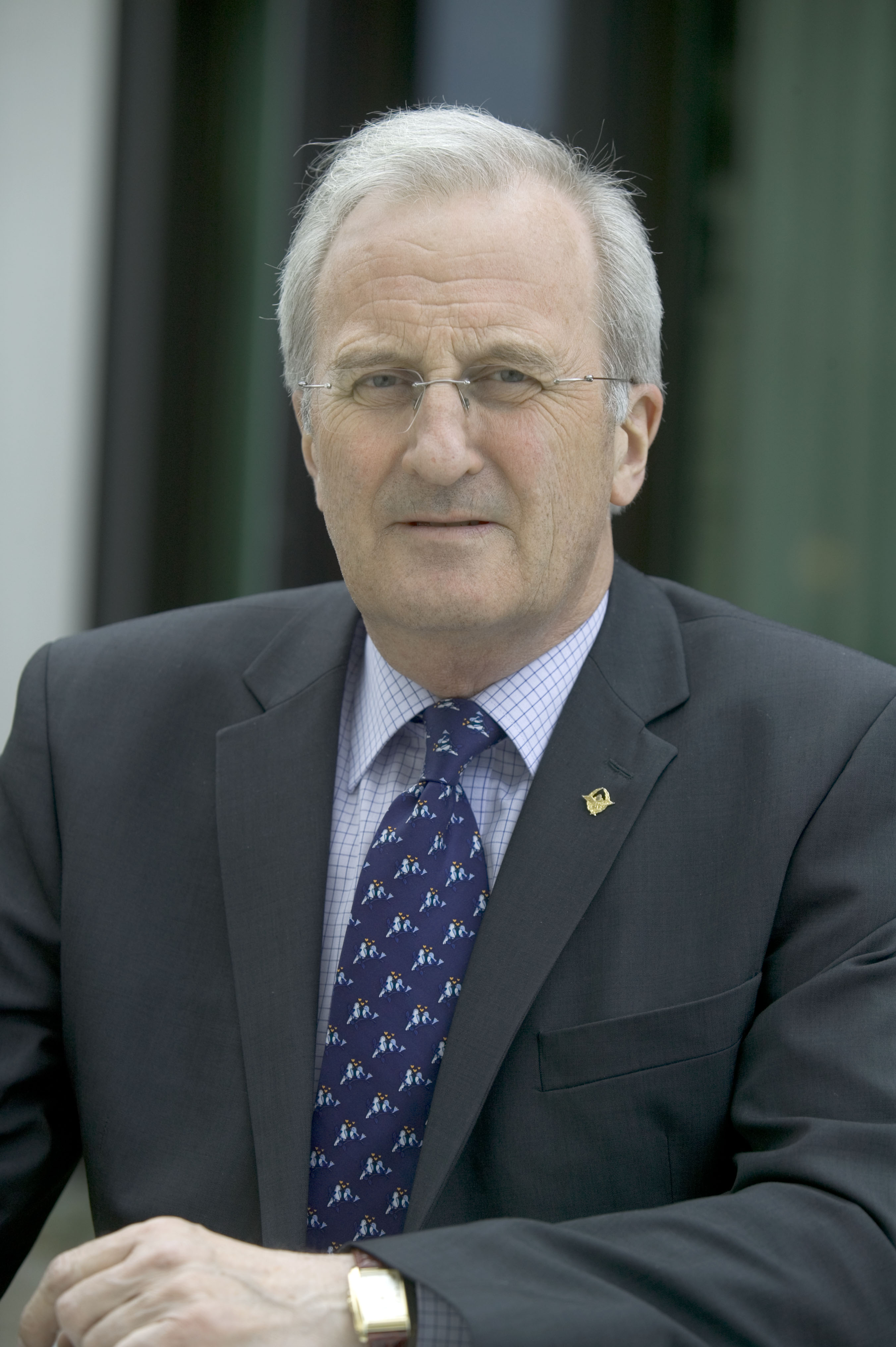 Per Ove With, FrP-politiker